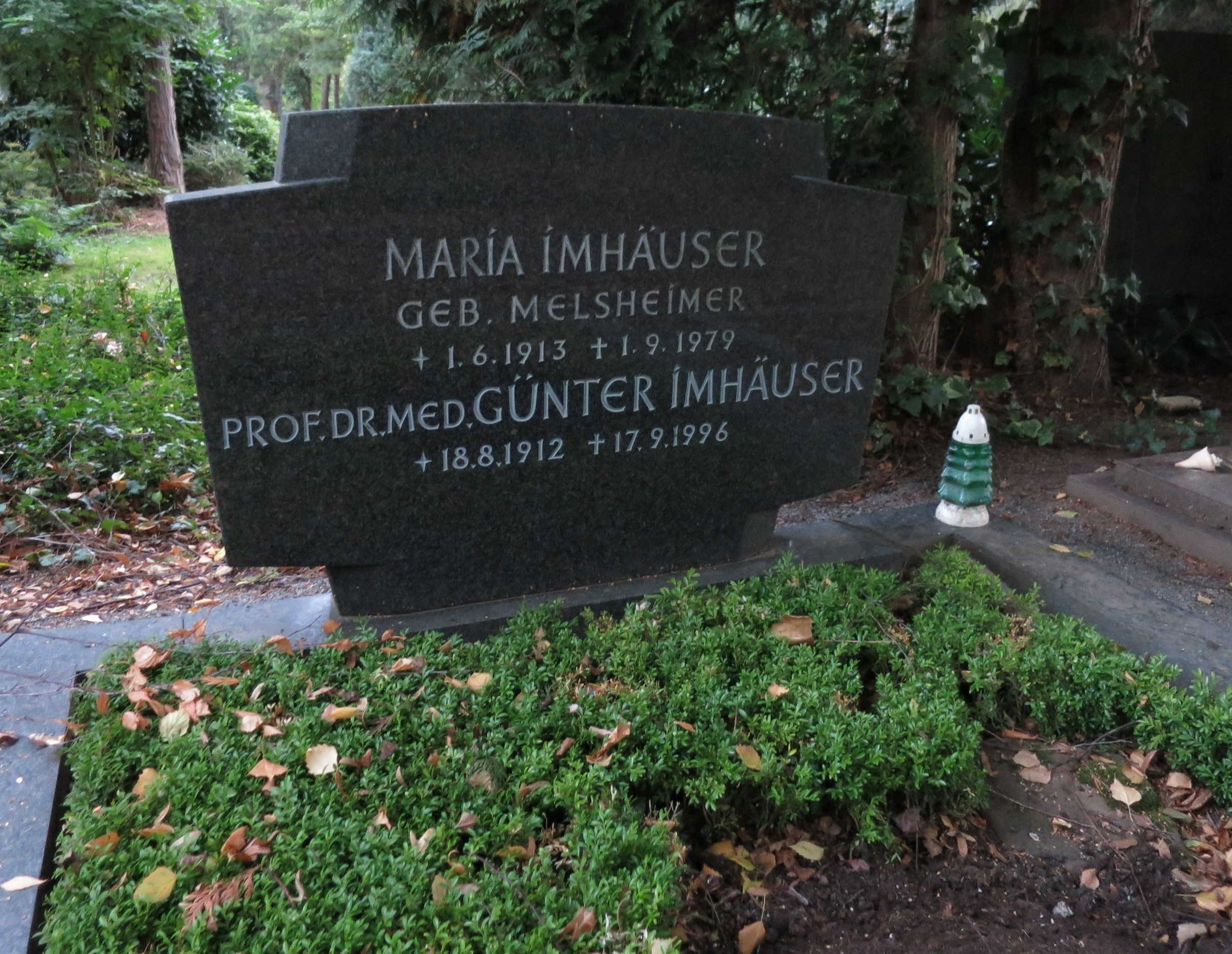 Günter Imhäuser - Grab auf Melaten-Friedhof